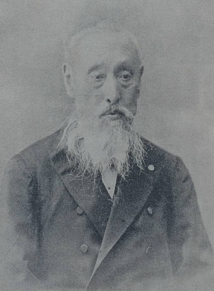 久我建通の肖像写真。